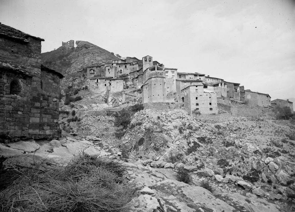 Imatge